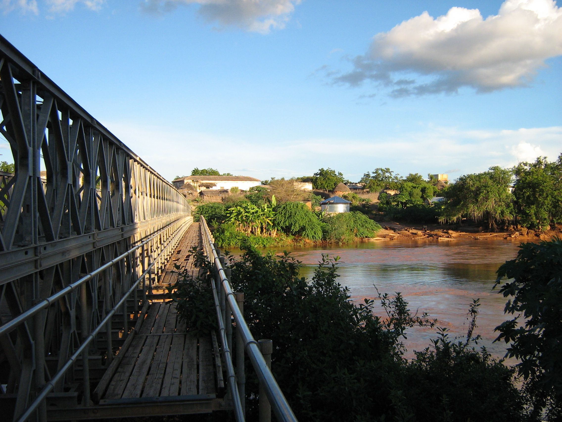 Bridge in Baardhere (Bardera), Somalia